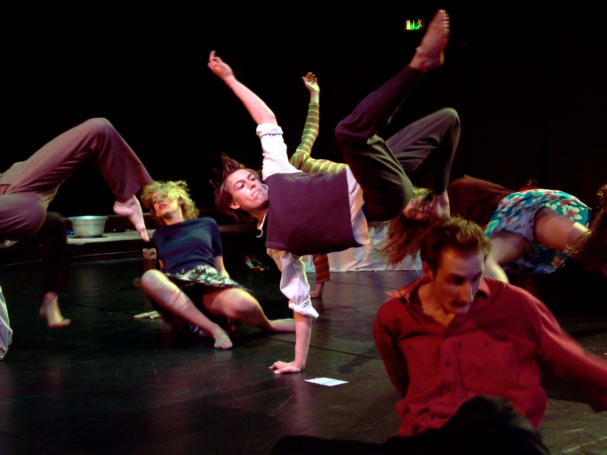 Szene aus dem Theaterstück ADIEU von Ives Thuwis (aufgeführt am Forum Freies Theater)